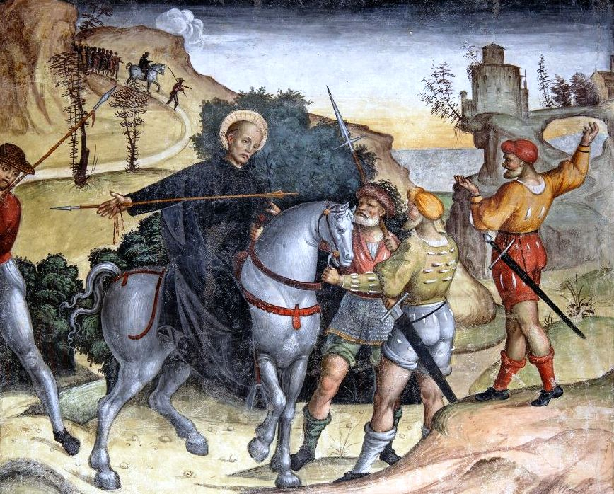 affresco